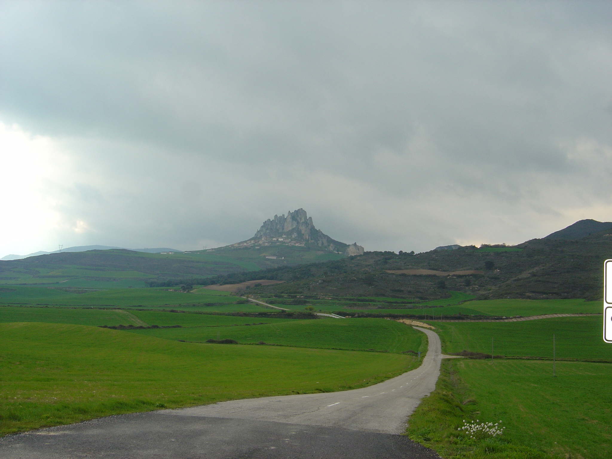 Cellorigo. La Rioja. Desde el Sur-Este